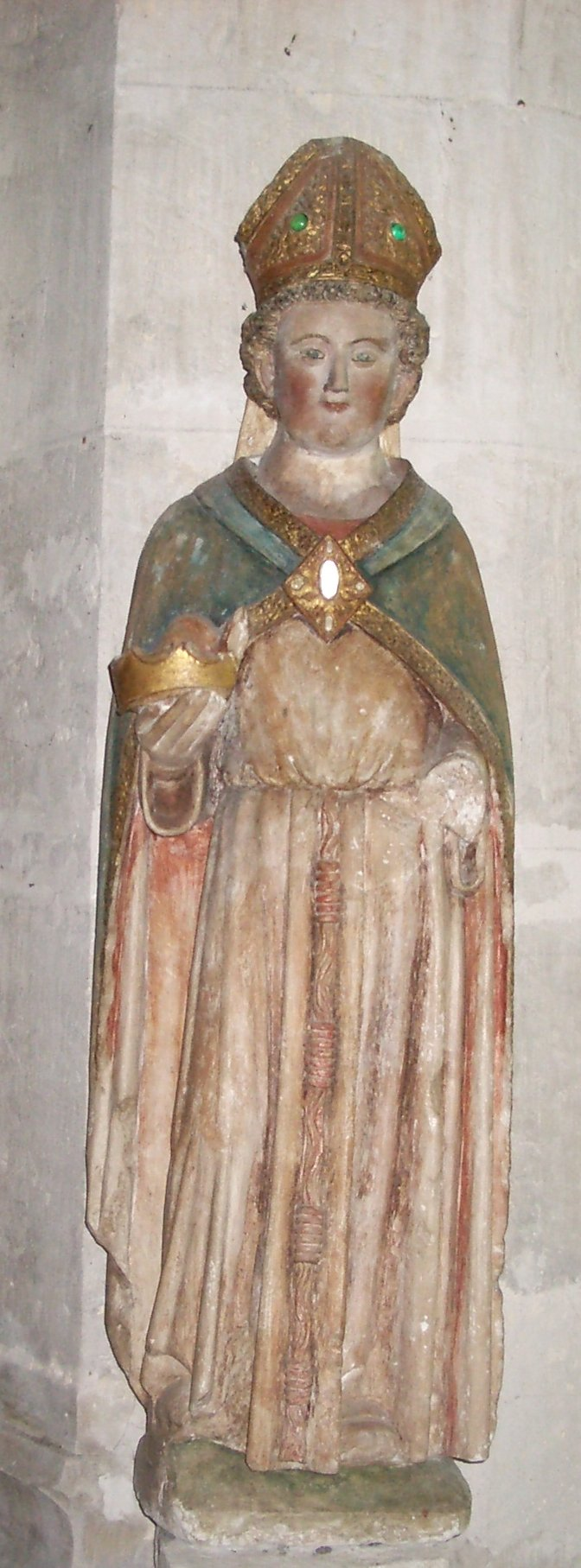 Saint Louis d'Anjou dans l'église de Giverny (Eure)